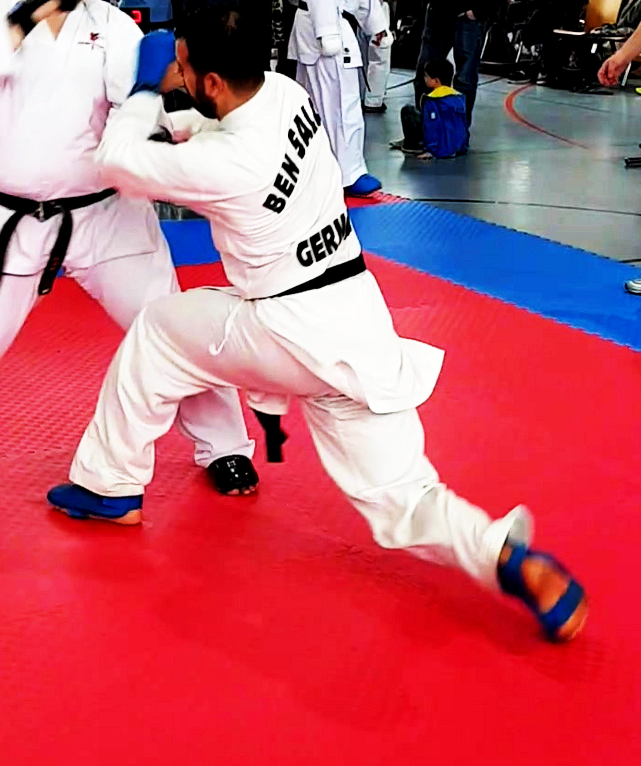 Kumite 2021